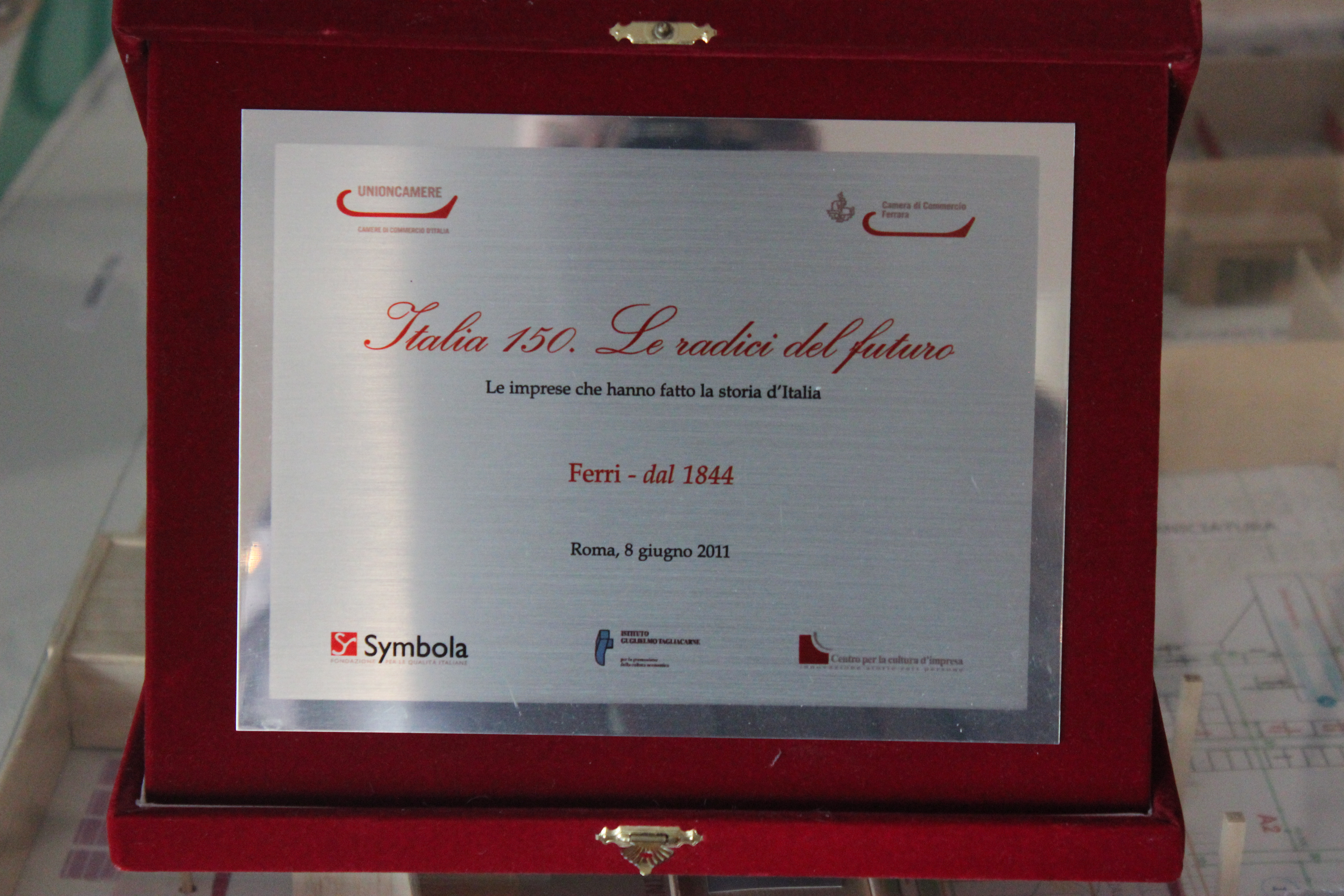 Памятная табличка